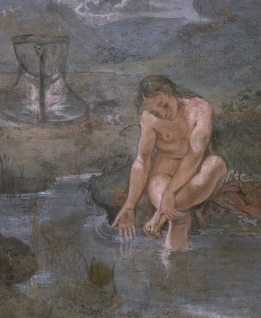 detail